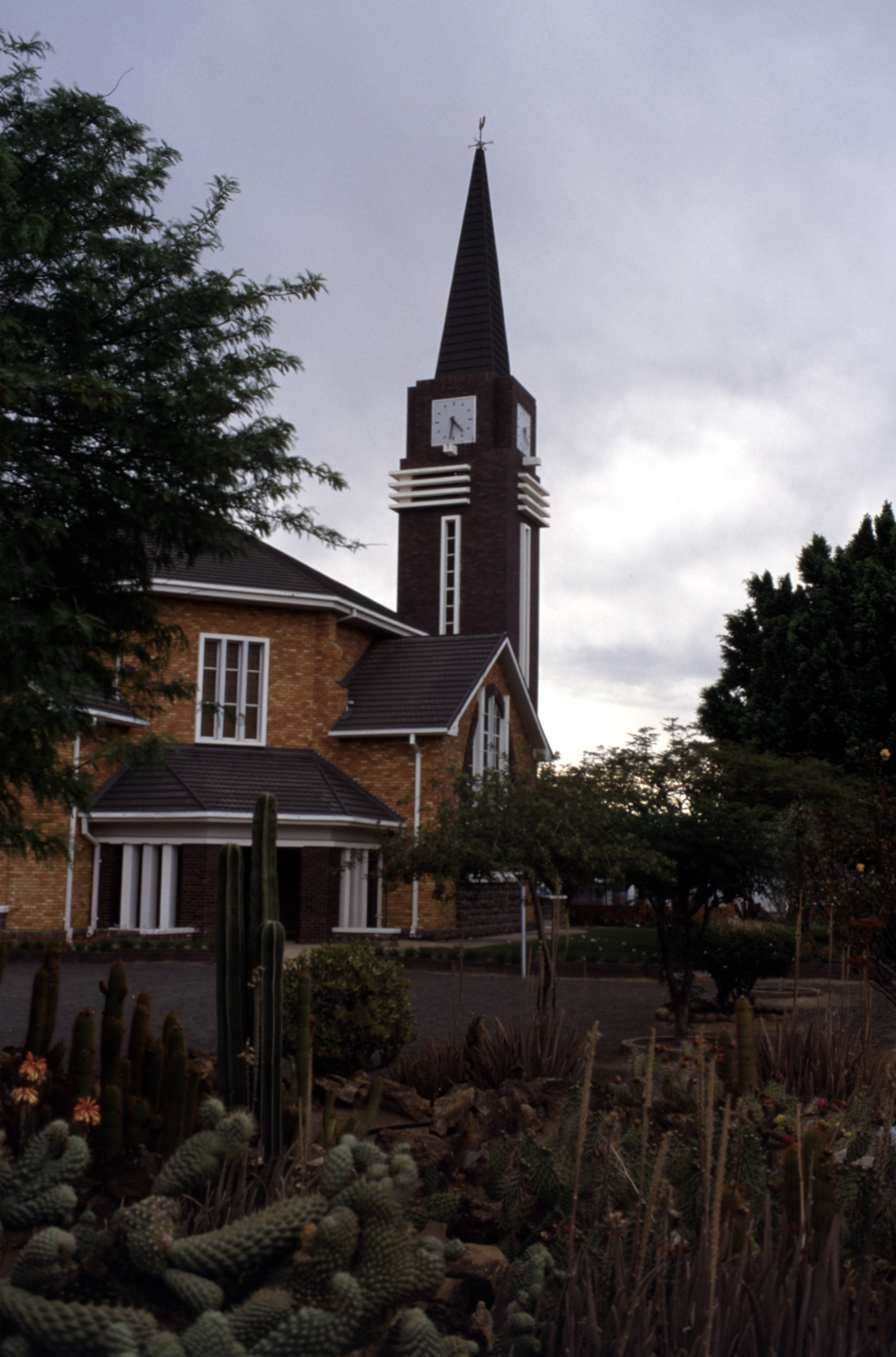 Niederländisch-refomierte Kirche in Keetmanshoop, Namibia, Oktober 2002.